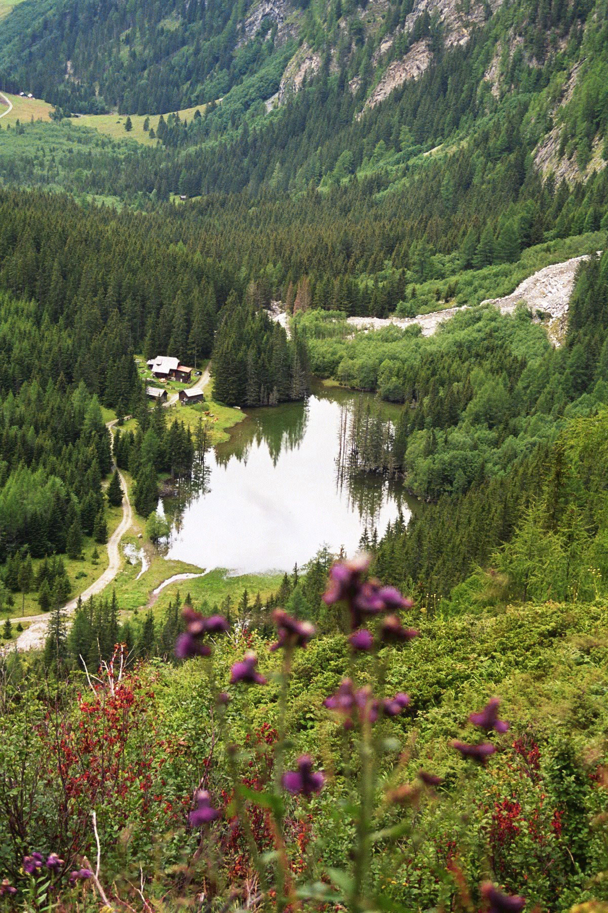 Blick auf den Konradlacken beim Aufstieg zum Dösner See